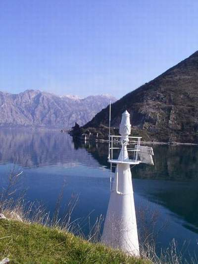 Verige